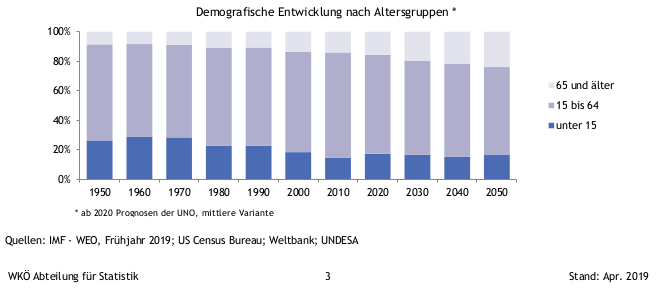 WKO Belarus